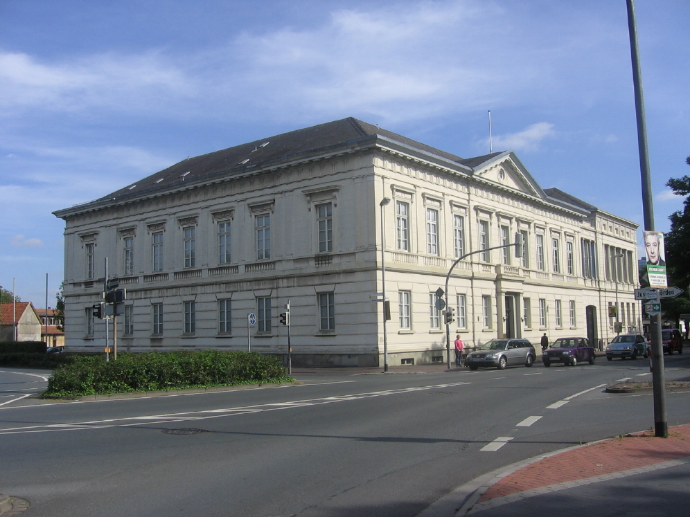 Dat Prinzenpalais in Ollnborg.